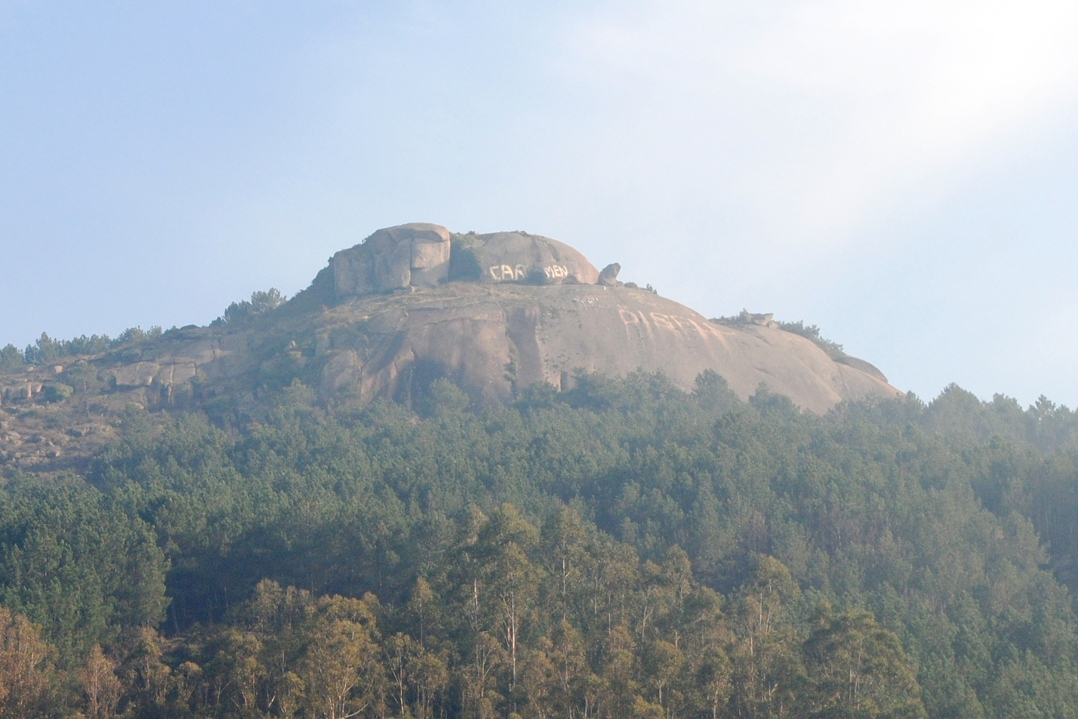 O Porriño, Castelo de Cans, 358 m